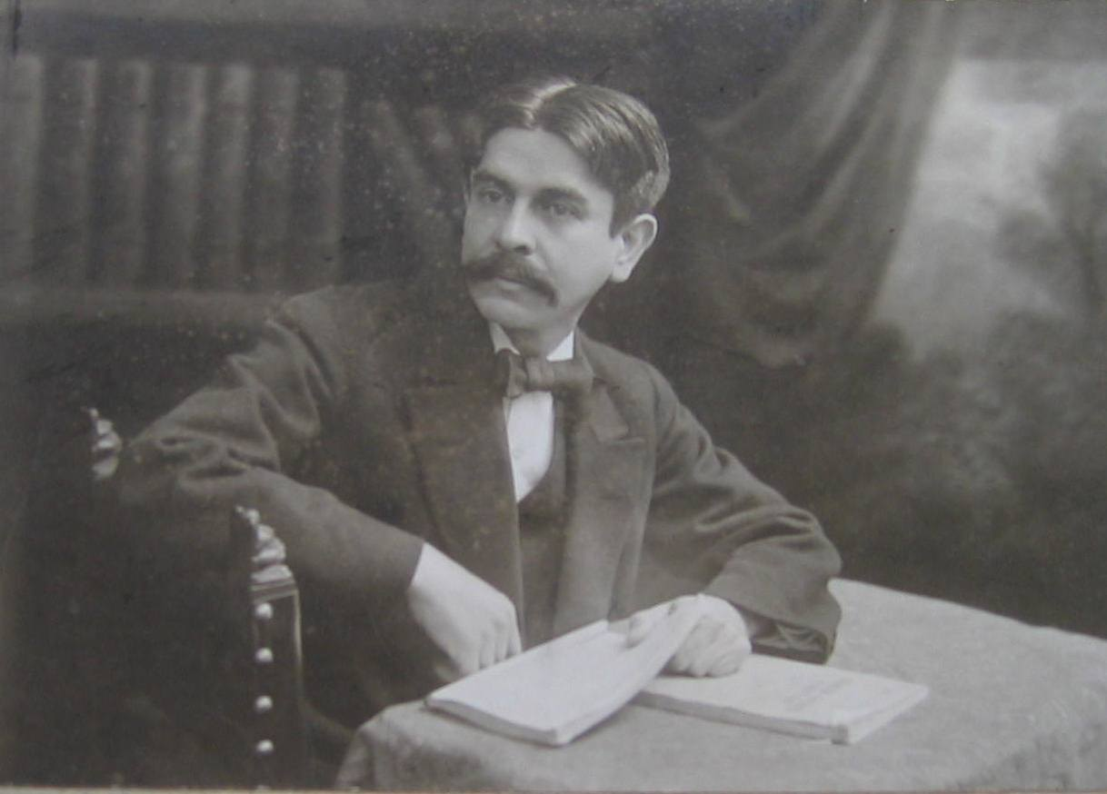 Alberto Masferrer, escritor, filósofo y político nacido en Alegría (El Salvador) en 1868 y fallecido en Tegucigalpa (Honduras), en 1932.